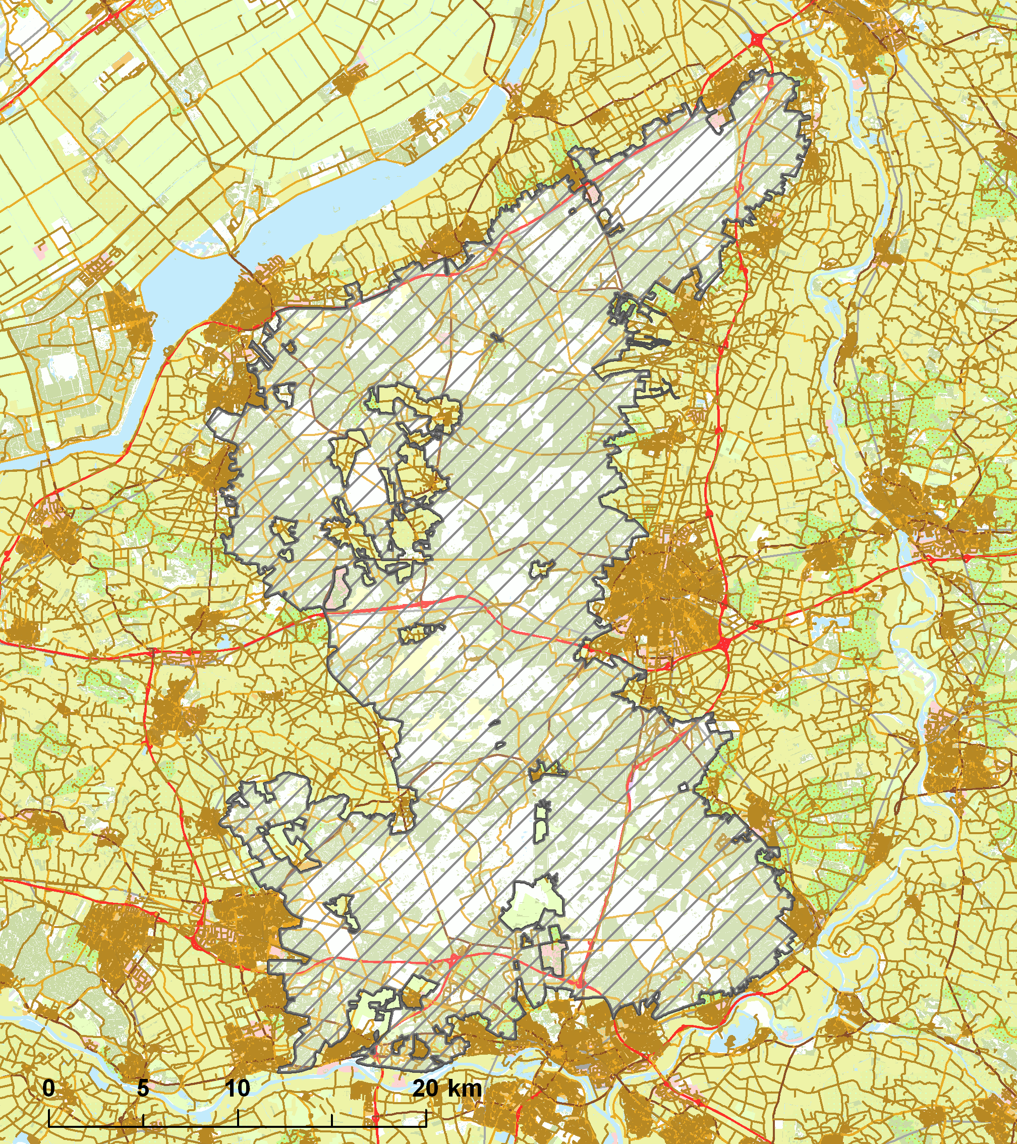 Natura2000 - Veluwe.png